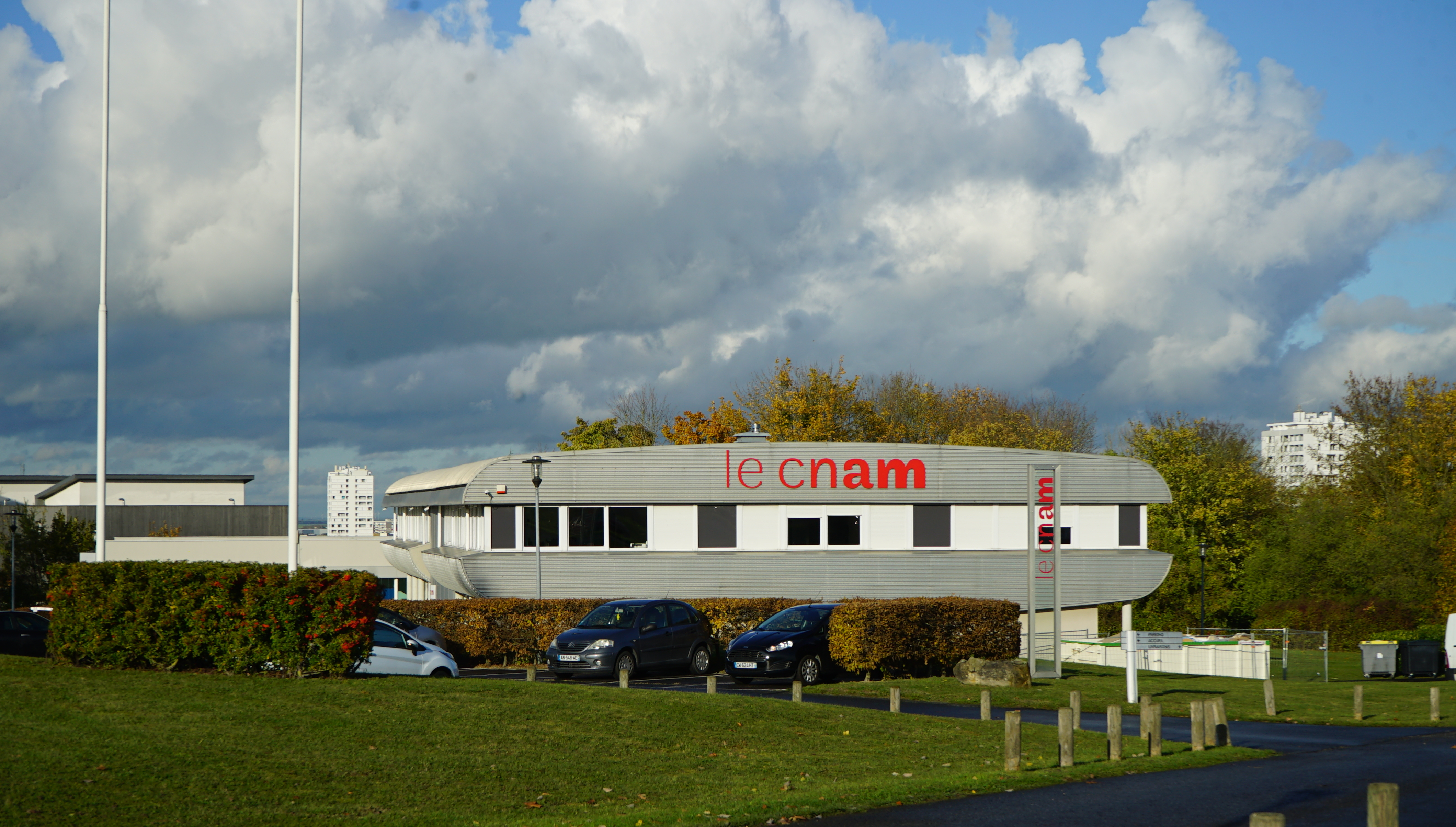 sur une vue ancienne.